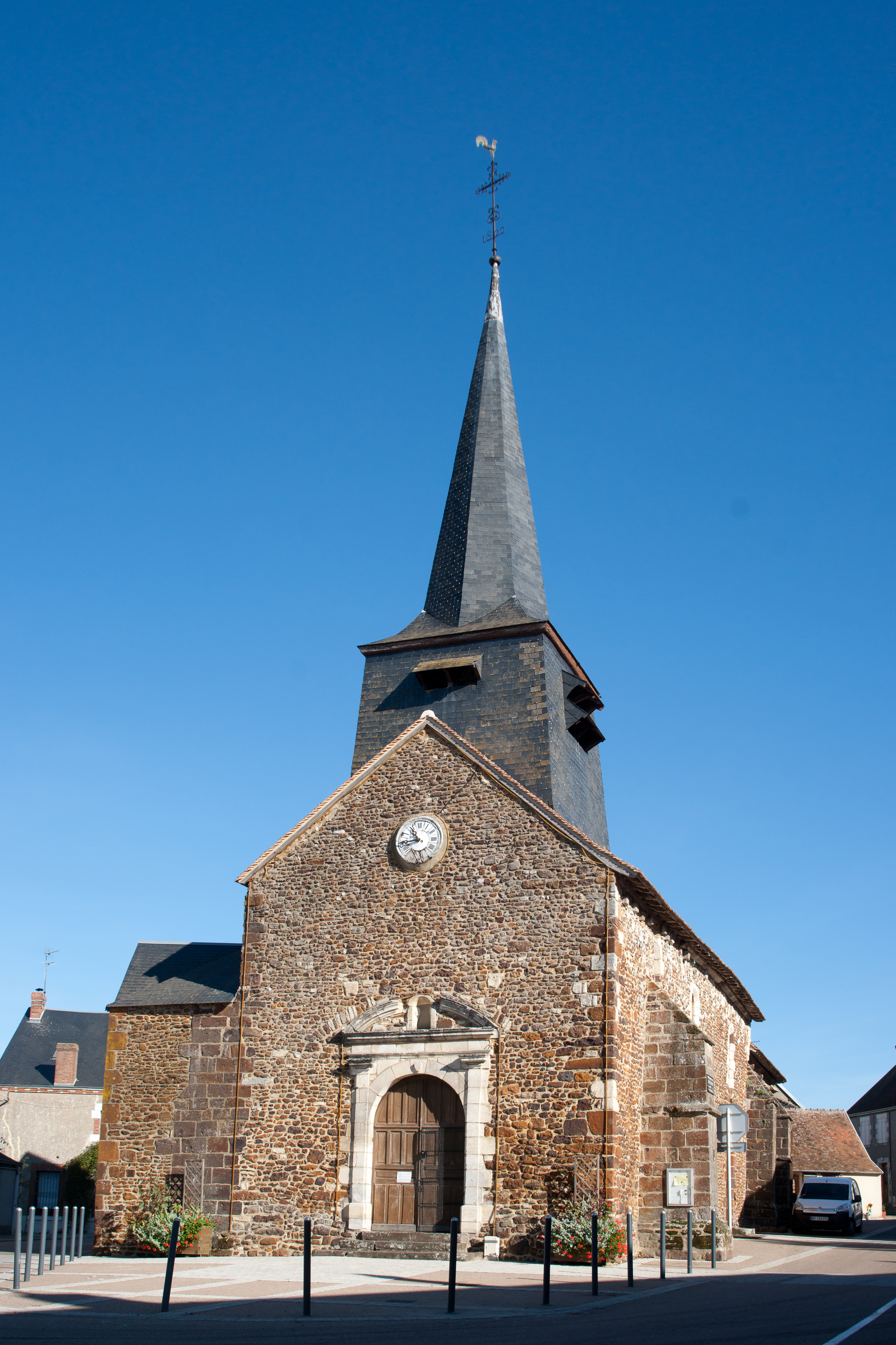 Sury-ès-Bois - église